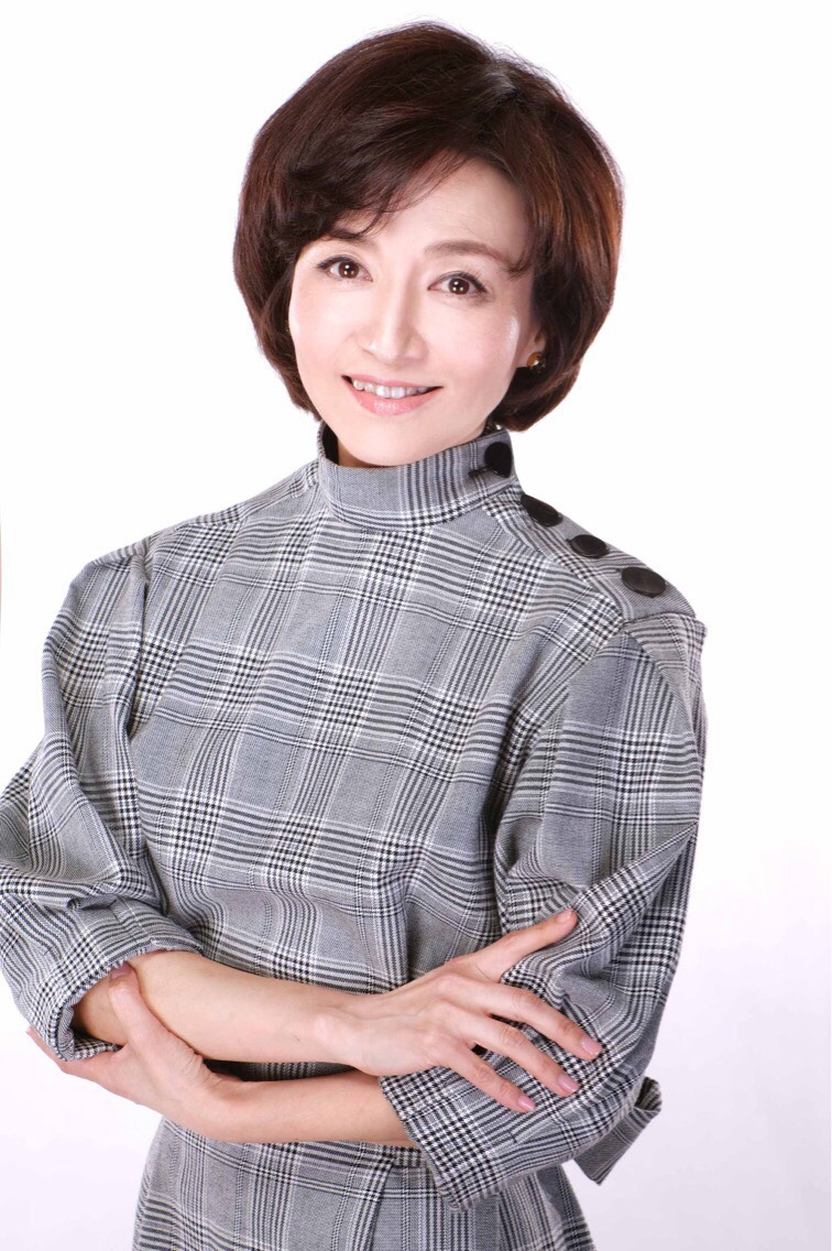 福田ちづる